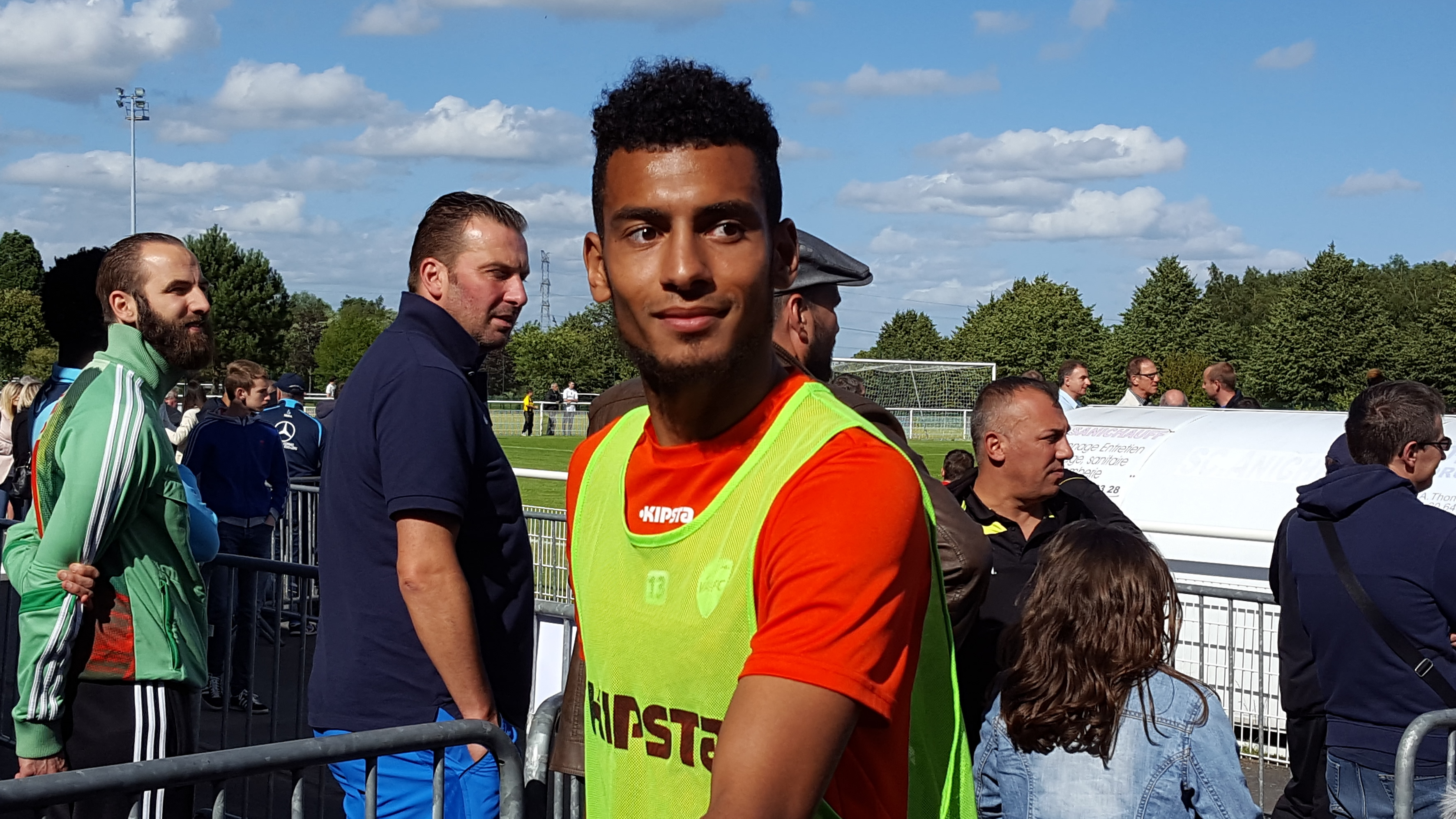 Angelo Fulgini avant le match amical Valenciennes / UNFP FC, le 2 juillet 2016, au Stade des Navarres à Aniche.